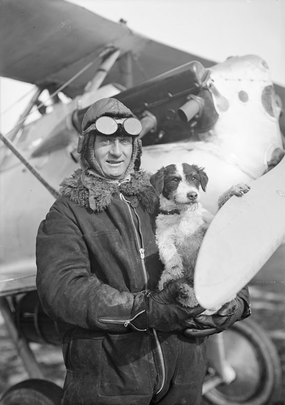 Motiv: Porträtt av Kapten Einar Lundborg med sin terrier framför flygplan, enligt uppgift J 2. Nieuport 29C-1. Tidsperiod 1926-1930. Ur: Gamla Malmen-samlingen. GM 602.